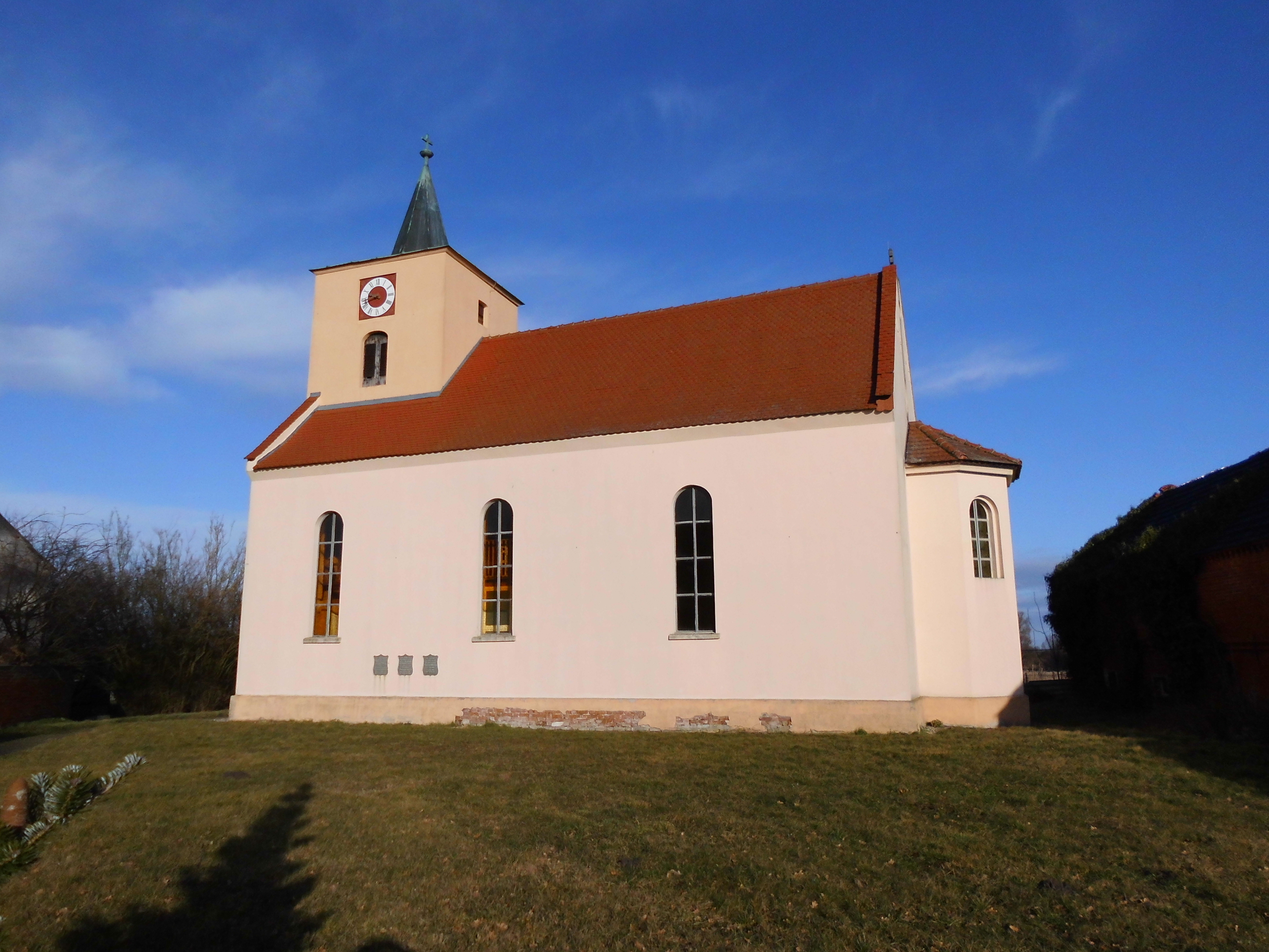 Dorfkirche Möthlitz, Ansicht von Süden, Februar 2014